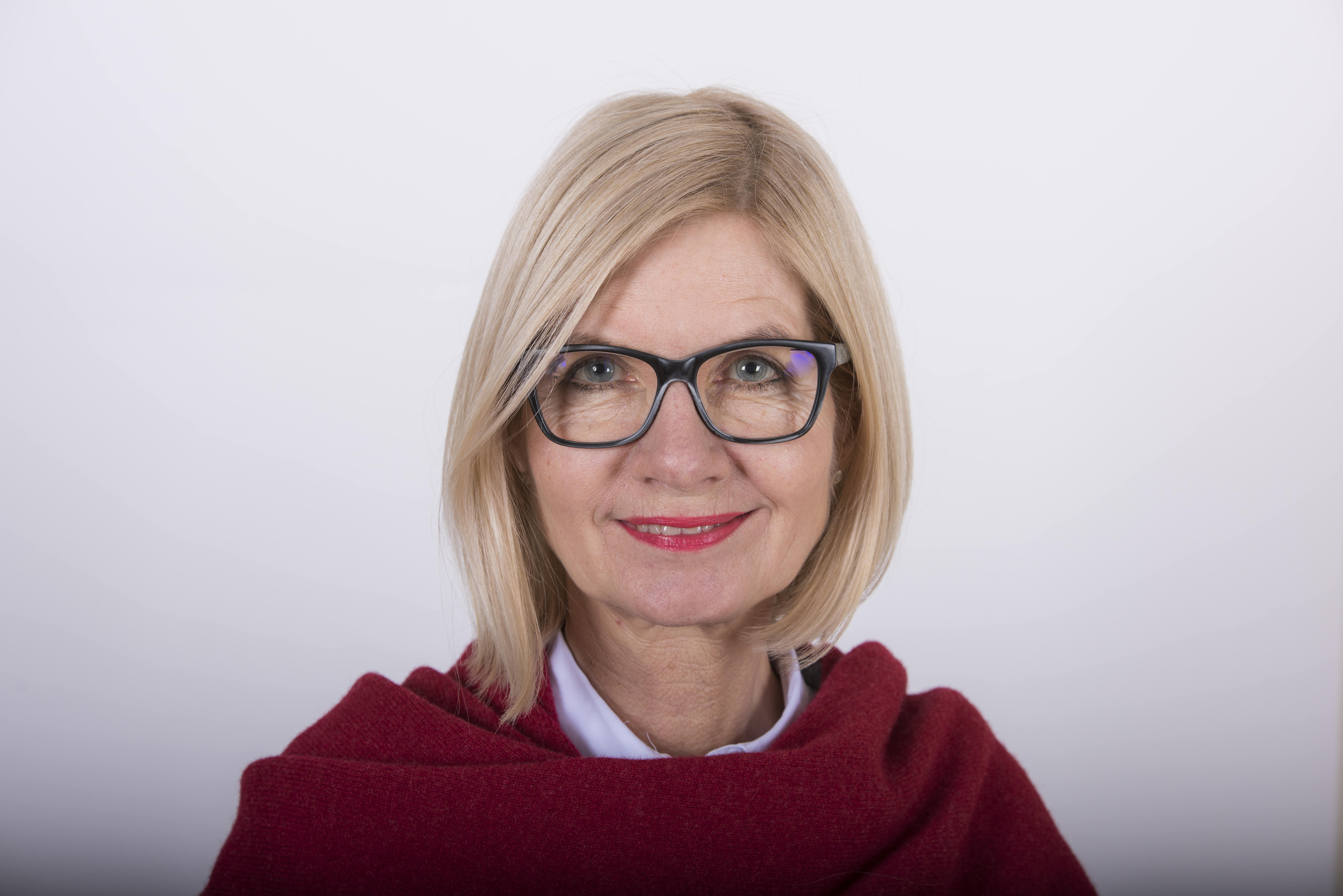 Abgeordnete zum Steiermärkischen Landtag